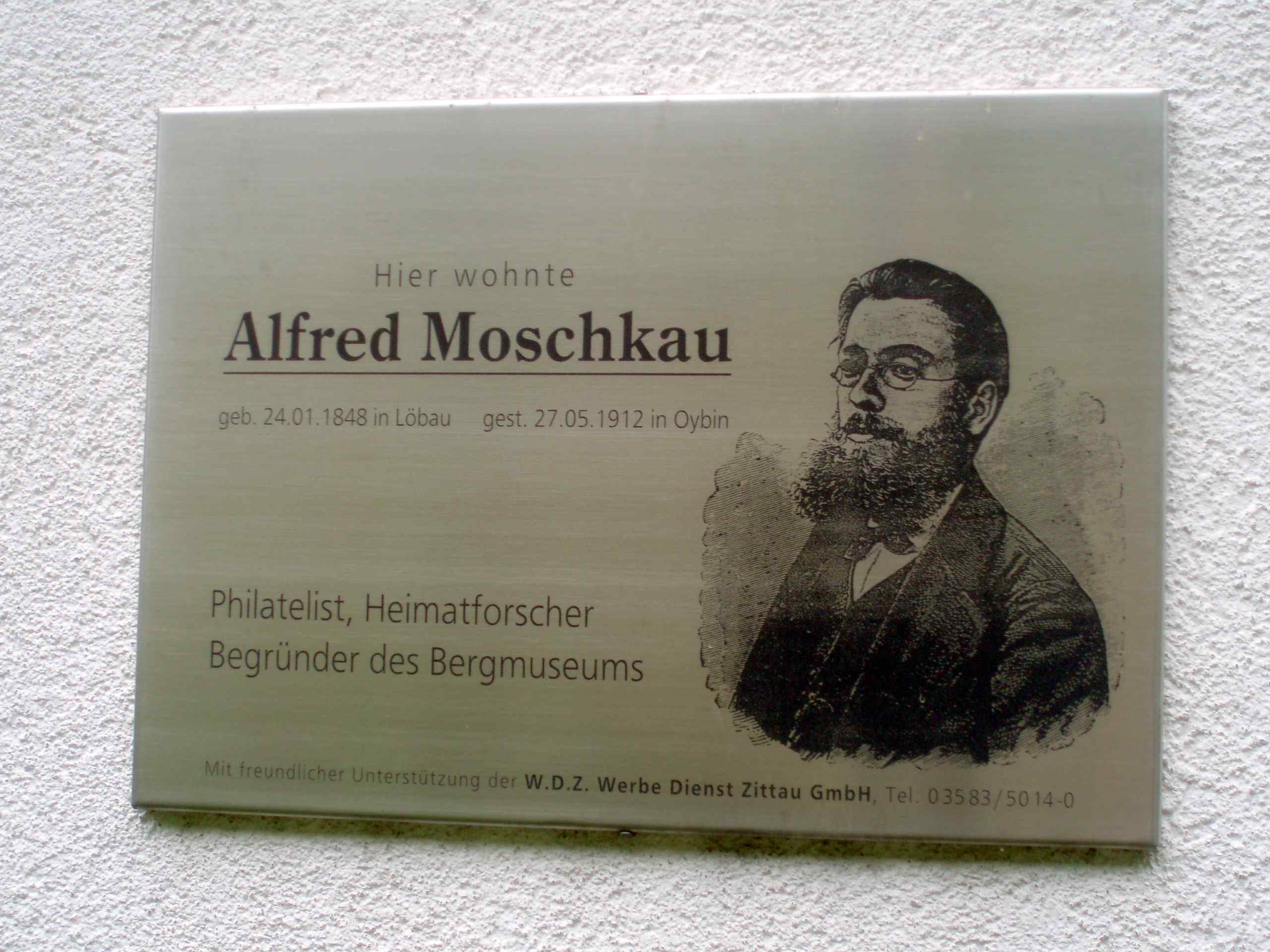 Gedenktafel am Wohnhaus von Alfred Moschkau